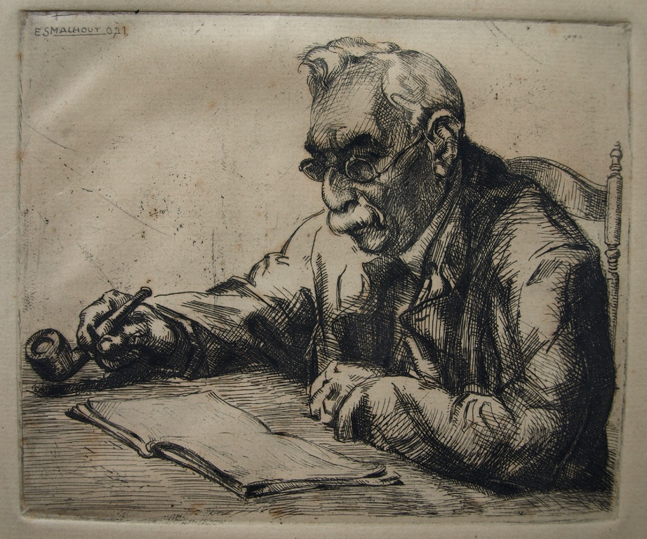 Zelfportret van Elie Smalhout, ca. 1930.